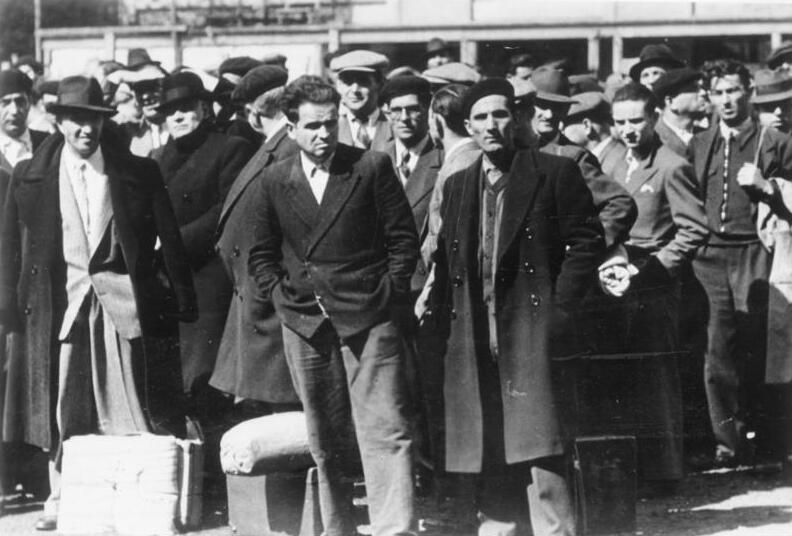 ADN-ZB/Archiv Frankreich in der Periode der deutschen Okkupation und des Vichy-Regimes 1940/44 In Paris festgenommene ausländische Juden. (Aufn: August 1941/Wisch) 8281-41